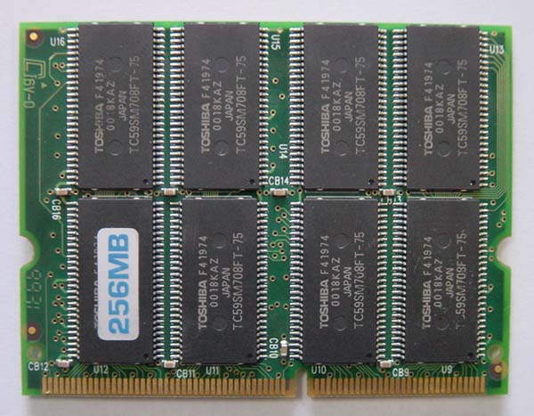 SO-DIMM module, PC100 144pin.